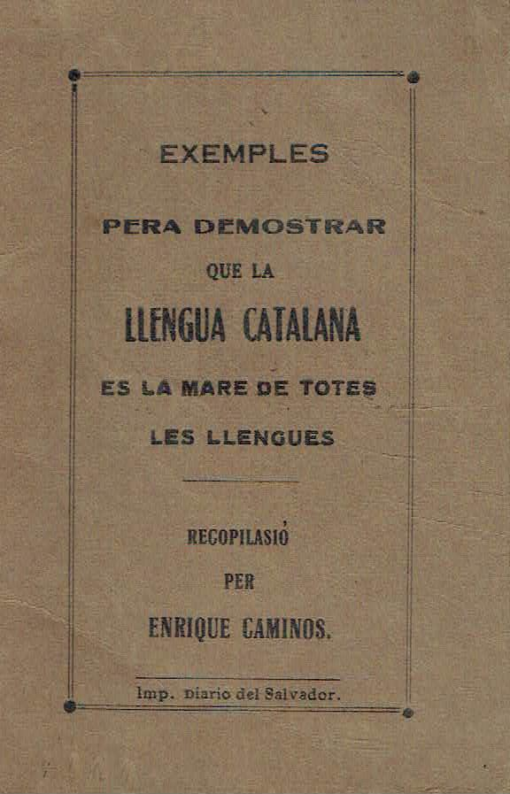 Portada de l'opuscle Exemples pera demostrar que la llengua catalana es la mare de totes les llengues, 190?, per Enrique Caminos (autor desconegut)